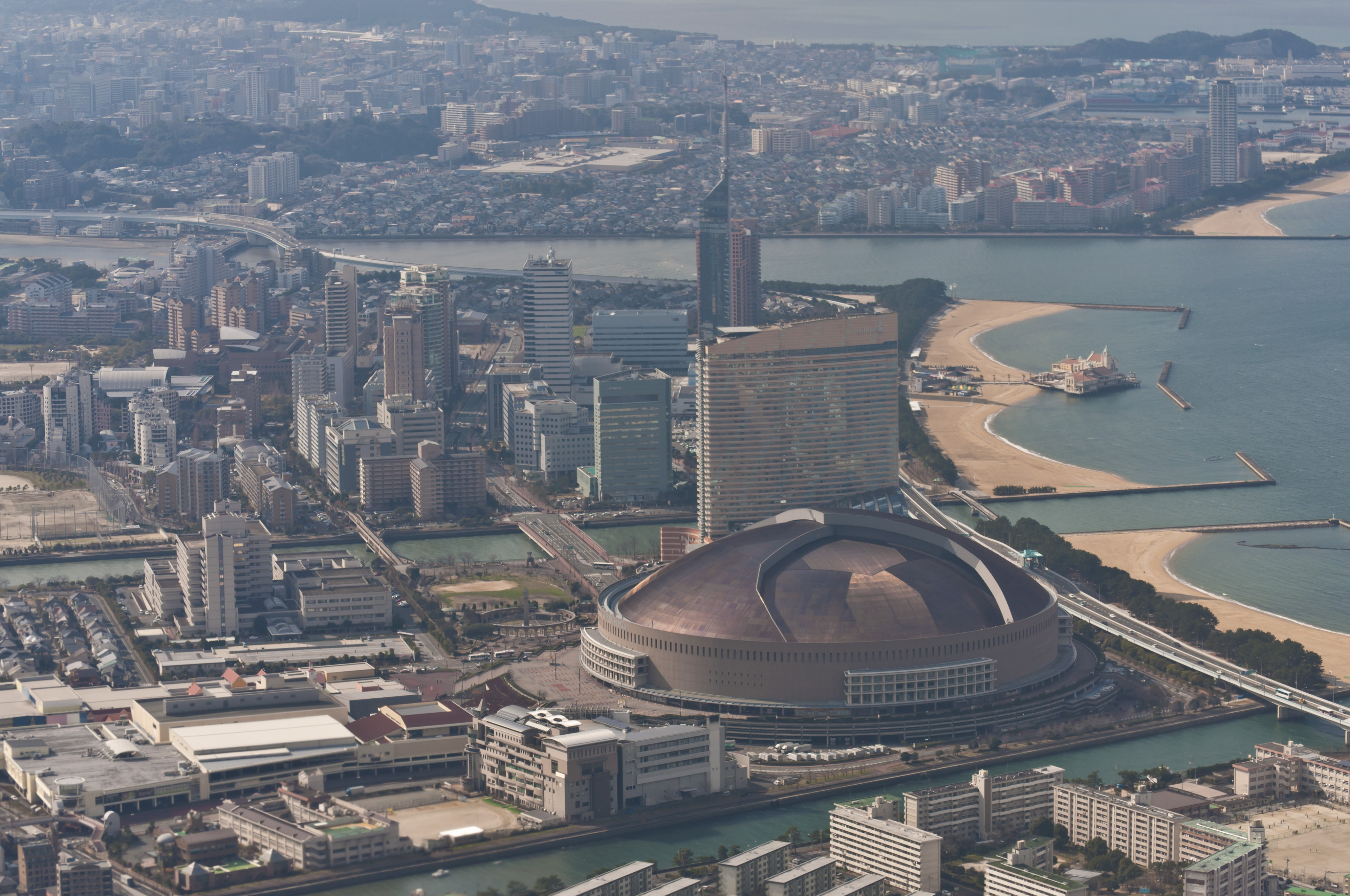 福岡ドームやシーサイドももち地区の空撮画像。2015年1月31日、福岡空港に進入中の旅客機から投稿者が撮影。（2014年9月の電子機器使用制限解禁後）